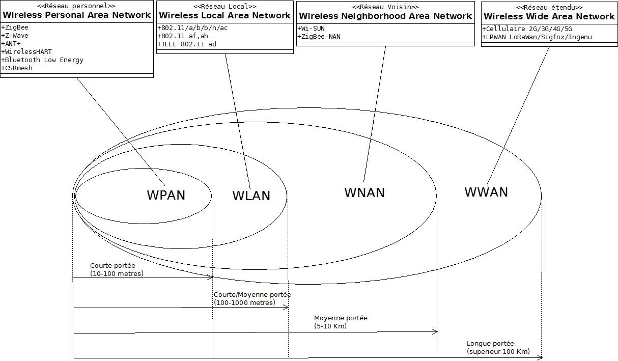 Reseau WPAN WLAN WNAN WWAN